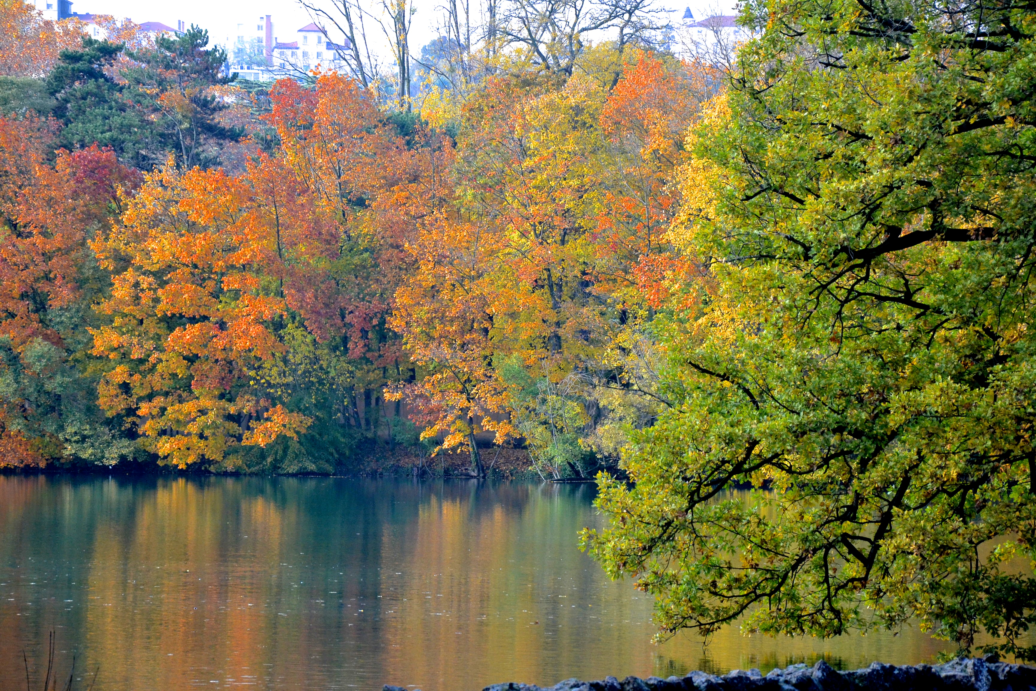 Le lac du parc de la Têt d'Or à Lyon (Rhône, France).